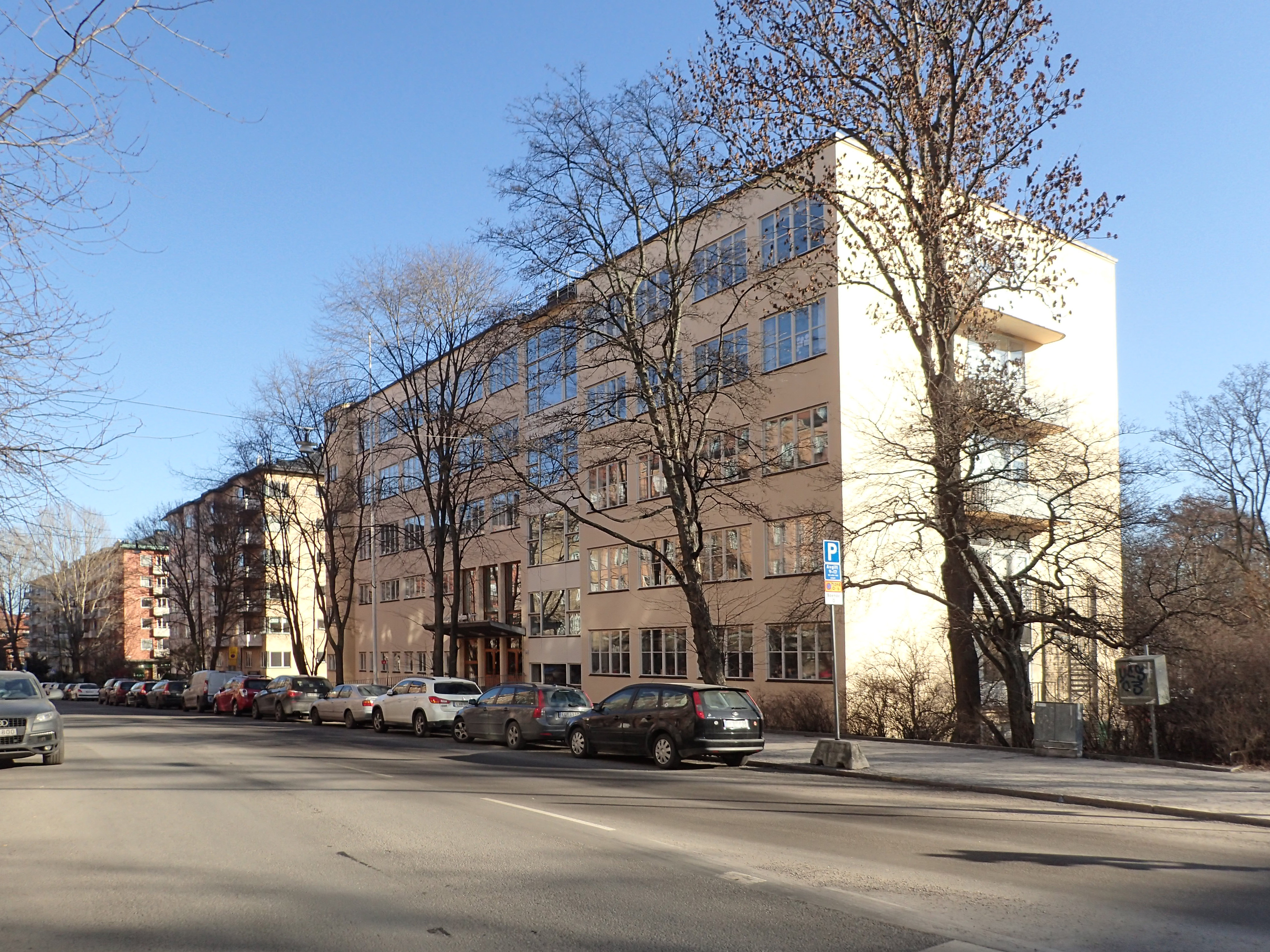 Östermalmsskolan, Banérgatan 38-40 Stockholm. kv. Artilleristen 1, Nybyggnadsår 1937 - 1939, David Dahl (Arkitekt) Karl Bergström (Byggherre) Karl Bergström (Byggmästare)